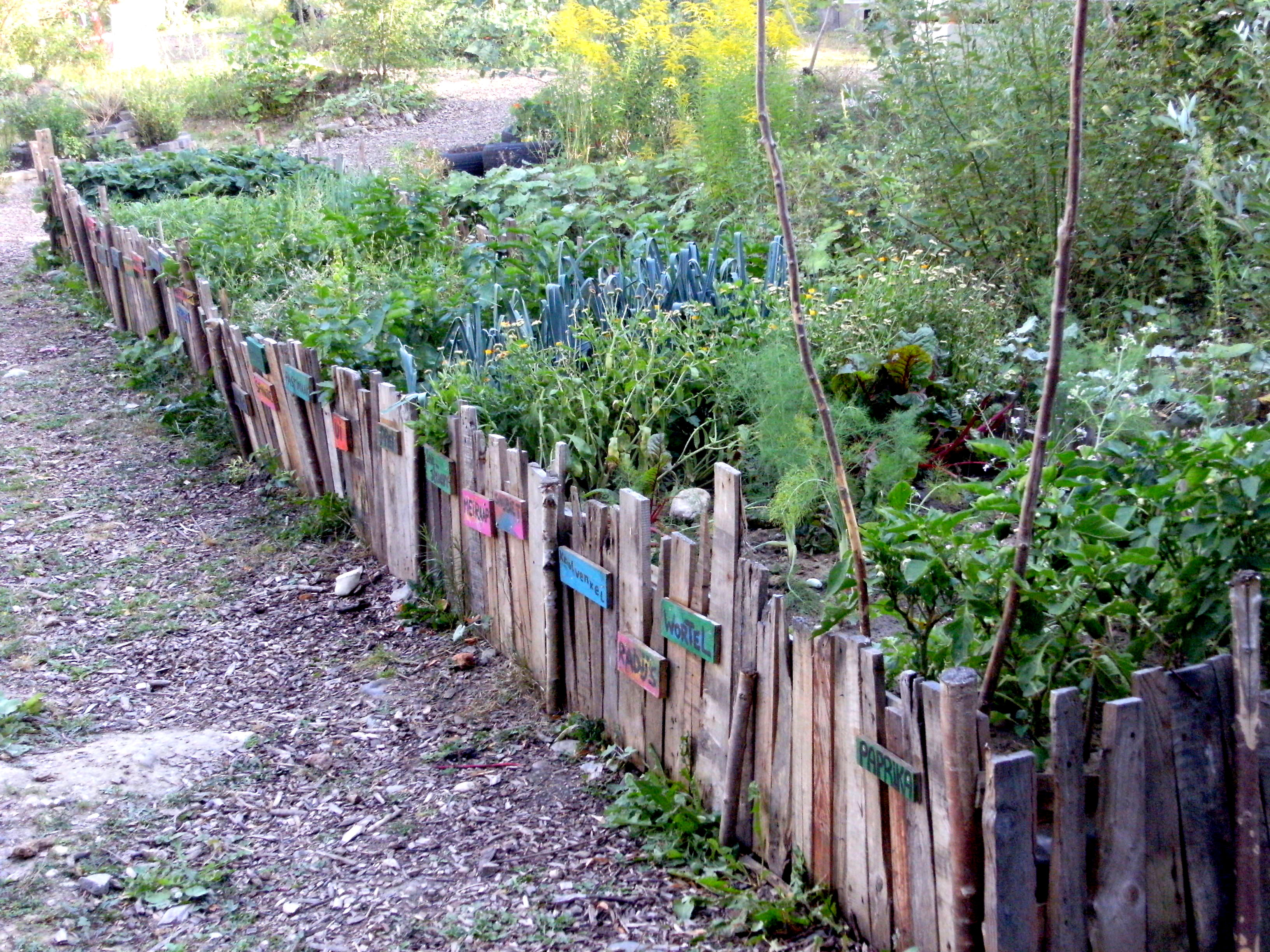 Maastricht 2012 Park op voormalig Sphinxterrein.